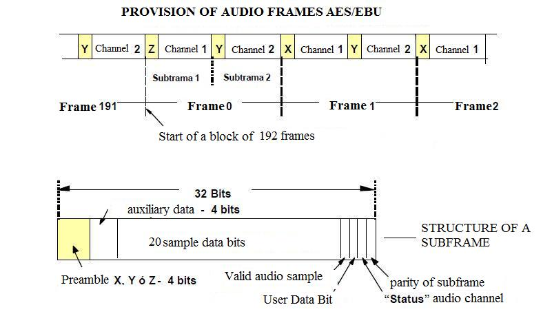 tramas de audio